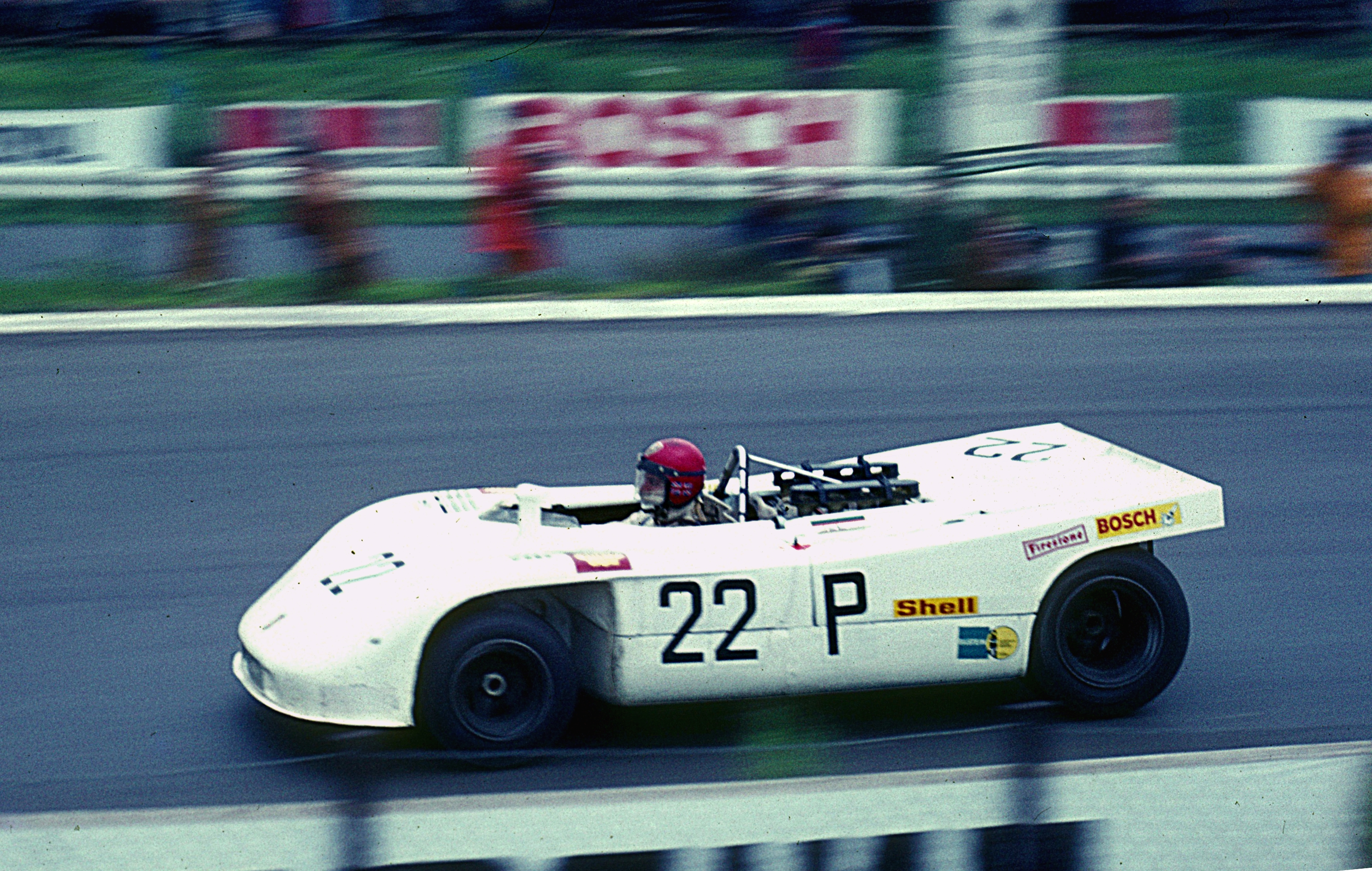 Porsche 908-3 mit Vic Elford beim 1000-km-Rennen auf dem Nürburgring eingangs Südkehre. Elford/Ahrens gewannen das Rennen vor Herrmann/Attwood